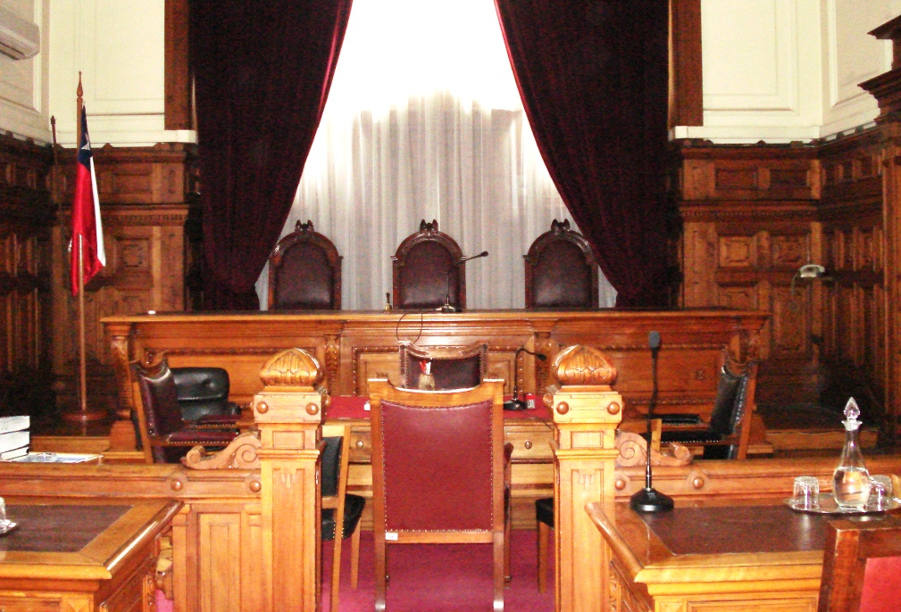 Salón de audiencias de una de las Salas de la Corte de Apelaciones de Santiago, ubicado en el Palacio de los Tribunales de Santiago de Chile.